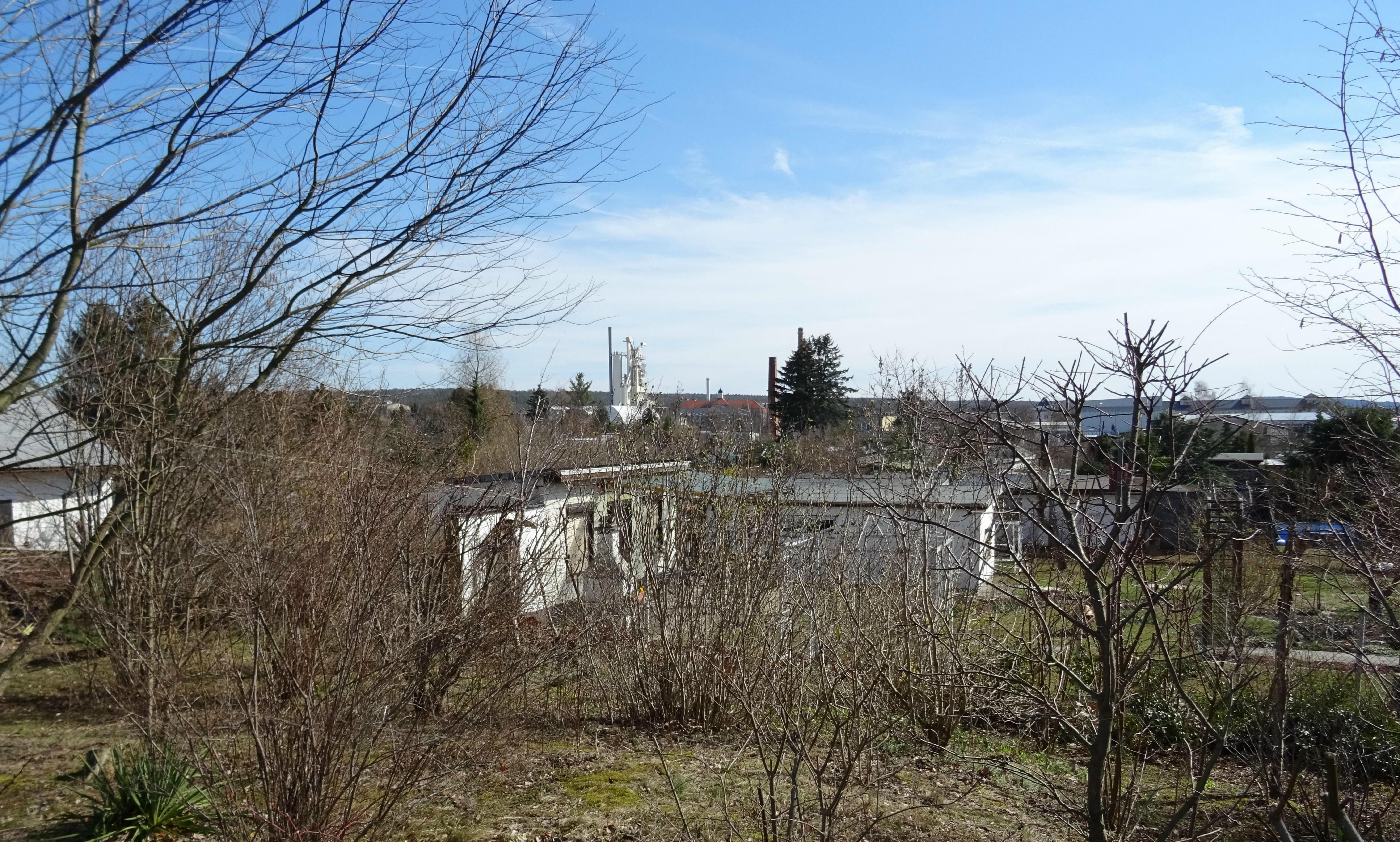 Hellerberge, Hellersiedlung am 16. März 2019